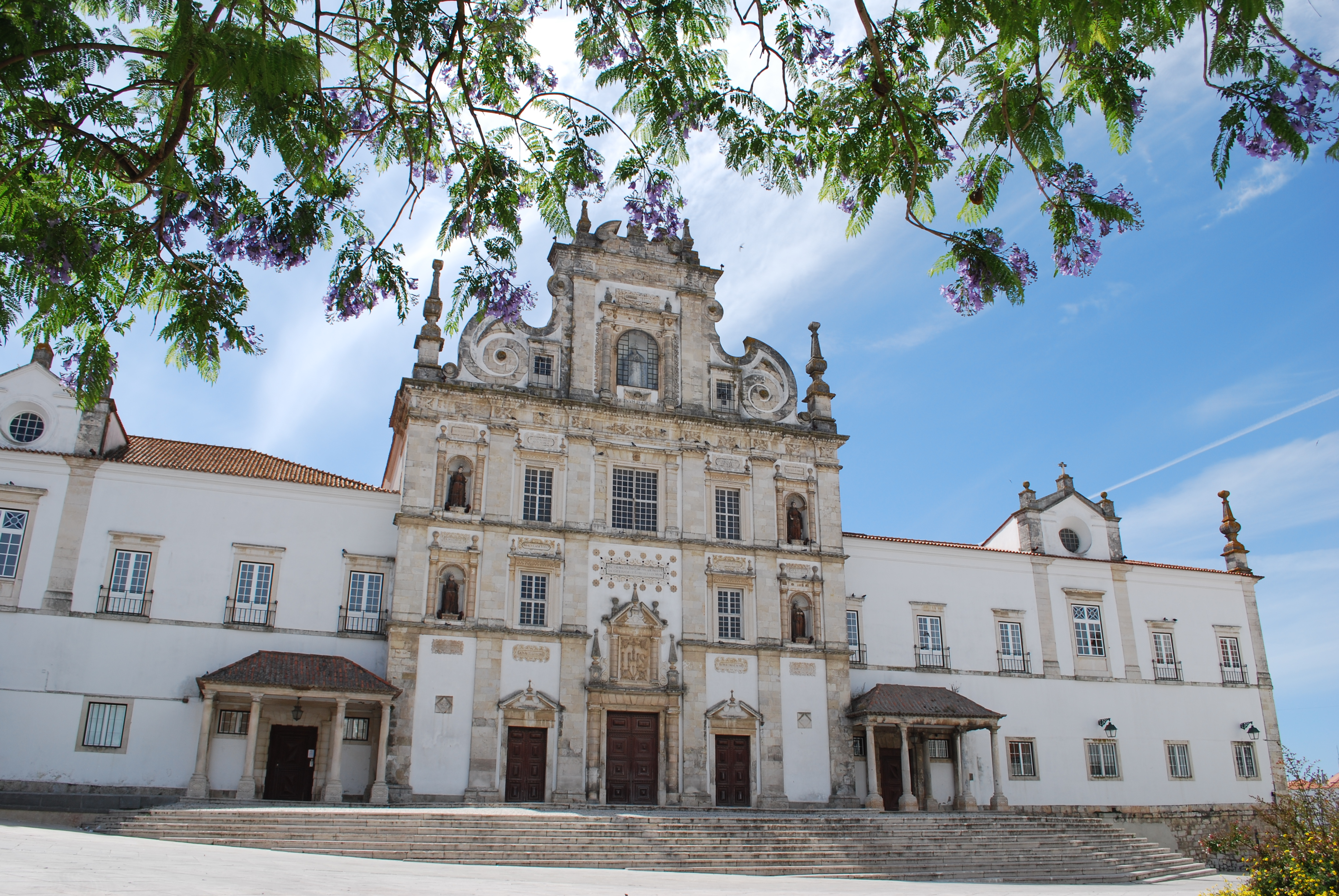 Igreja do Seminário ou Igreja de Nossa Senhora da Conceição do Colégio dos Jesuítas This file was uploaded for Wiki Loves Monuments in Portugal with the unique identifier 69798.